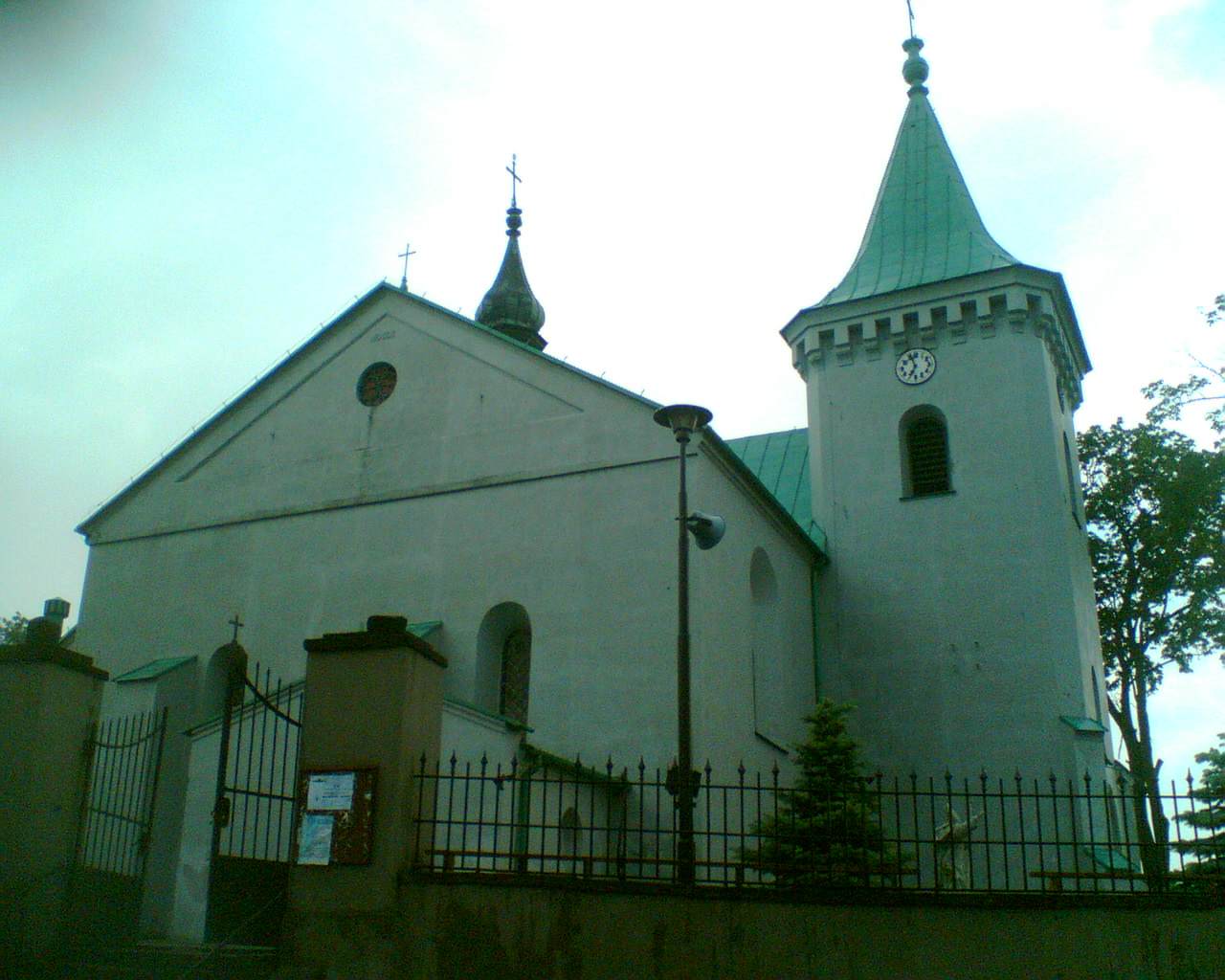 Radoszyce - kościół pw Św Piotra i Pawła